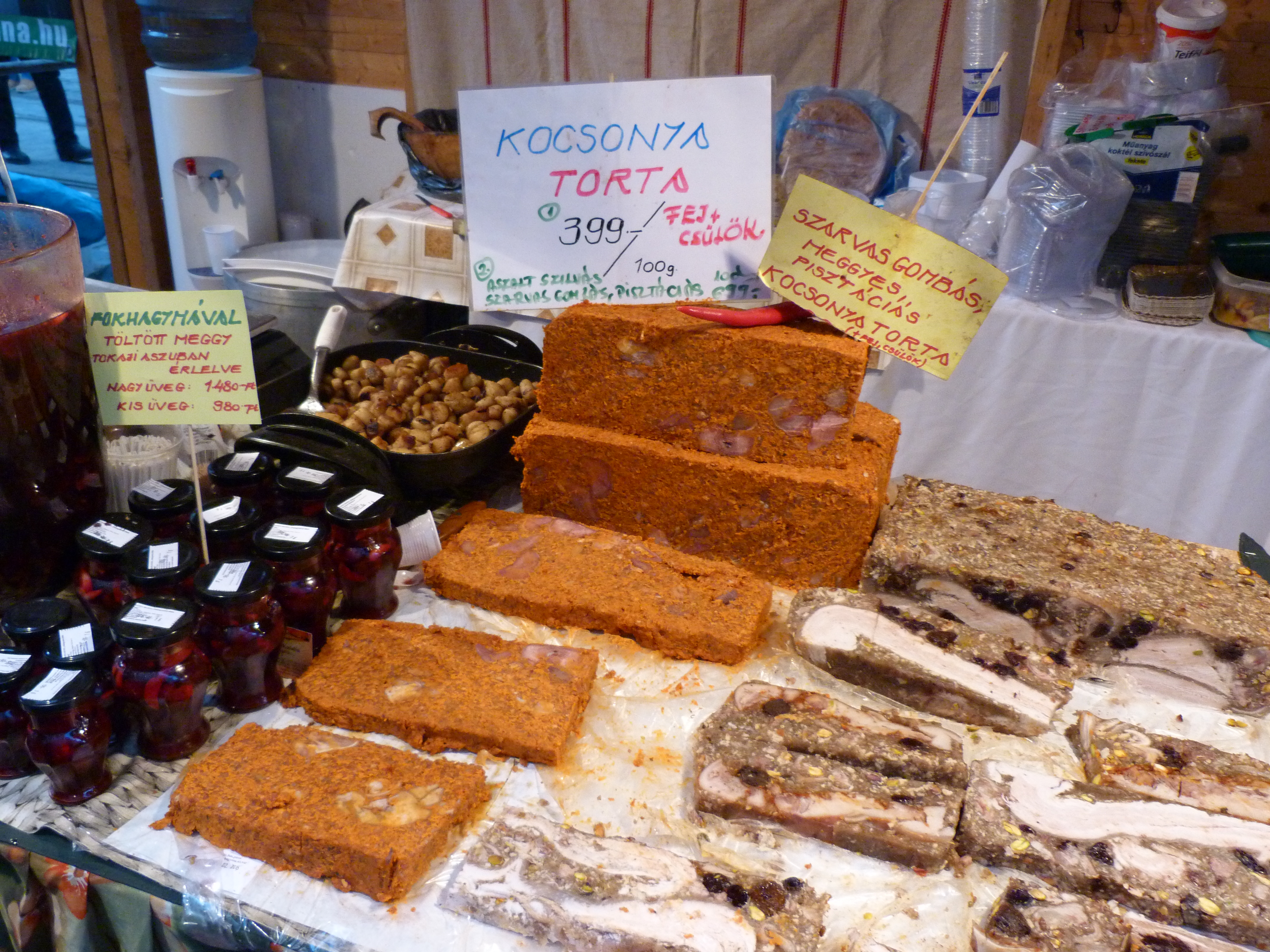 A felvétel 2015. február 7-én szombaton készült Miskolcon. Miskolci Kocsonyafesztivál. ©© Derzsi Elekes Andor, Budapest, 2015, Published in the Metapolisz DVD line. You are authorised to use this vid under Creative Commons – even for commercial, for profit purposes. The vid must be attributed to Derzsi Elekes Andor. All of the photos and vids in the Metapolisz DVD line are under Creative Commons and can be used even for commercial – for profit – purposes. Recommended Citation Derzsi Elekes Andor: Metapolisz DVD line